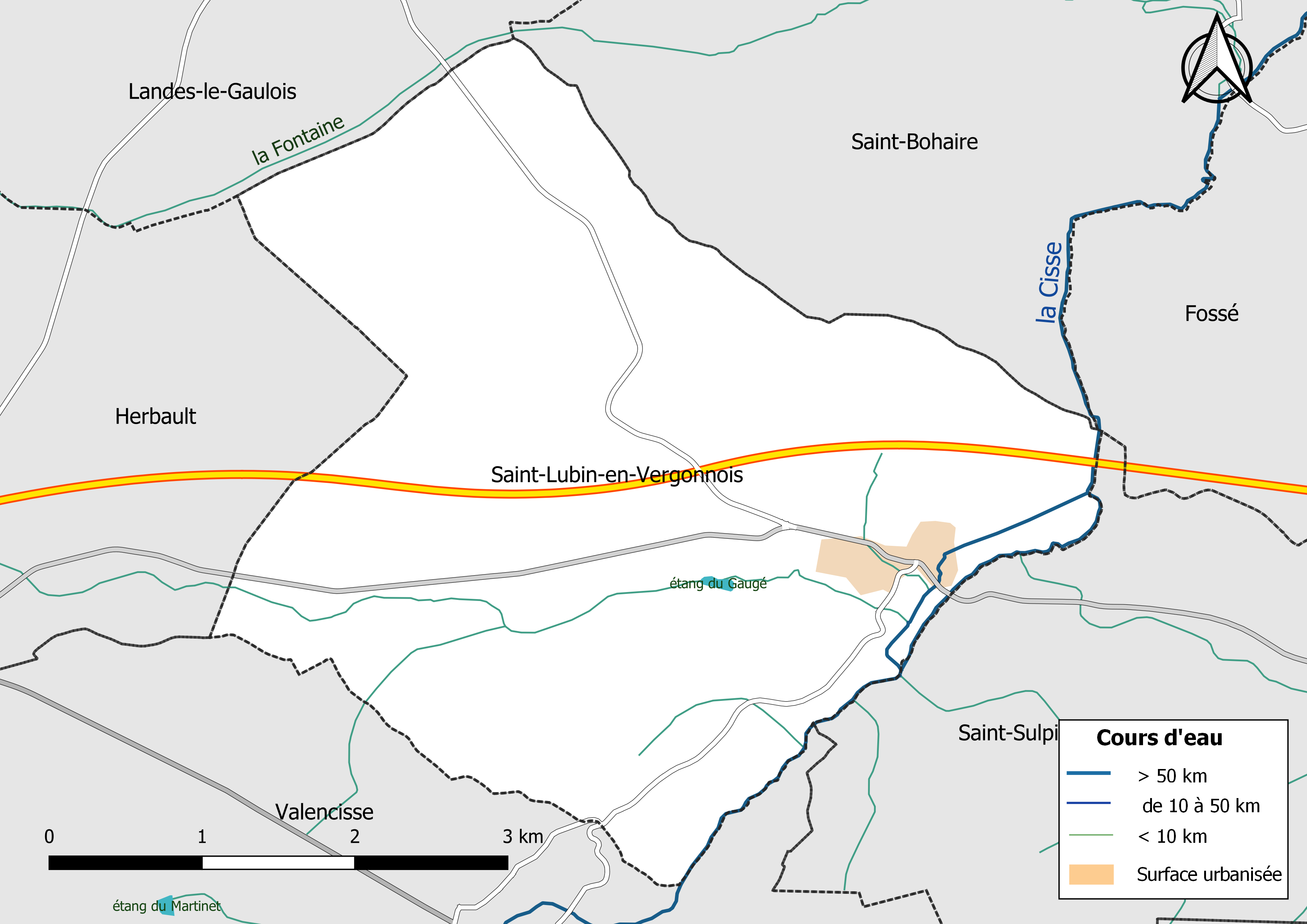 Carte du réseau hydrographique de la commune de Saint-Lubin-en-Vergonnois (Loir-et-Cher, France).